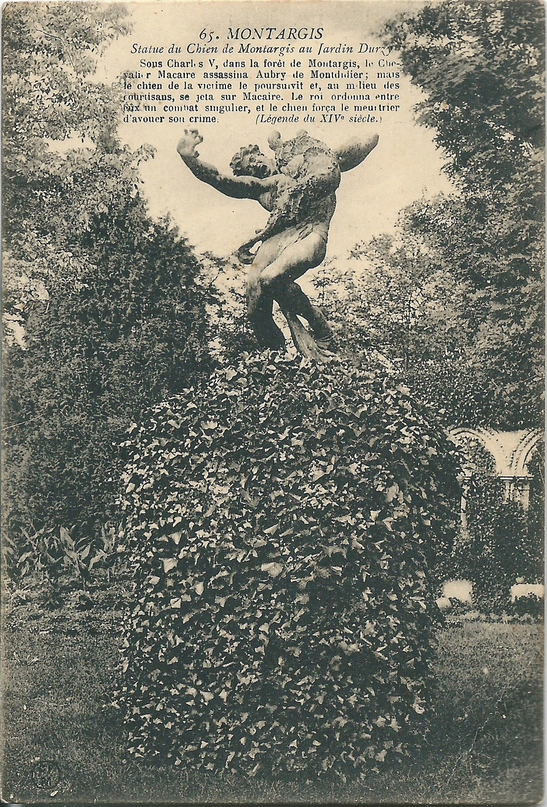 Montargis (Loiret, France) ; la statue du chien de Montargis au Jardin Durzy.